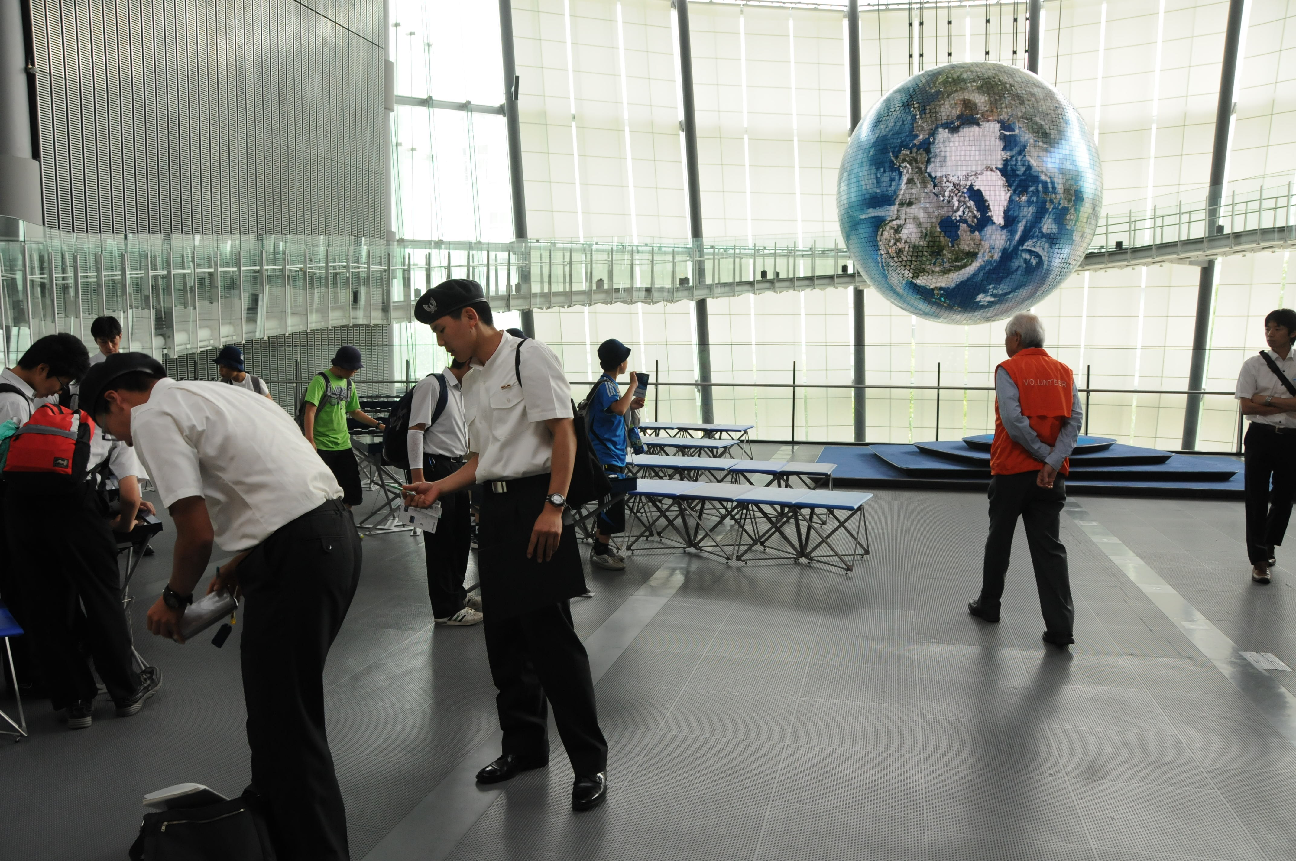 陸上自衛隊高等工科学校生徒、日本科学未来館にて。